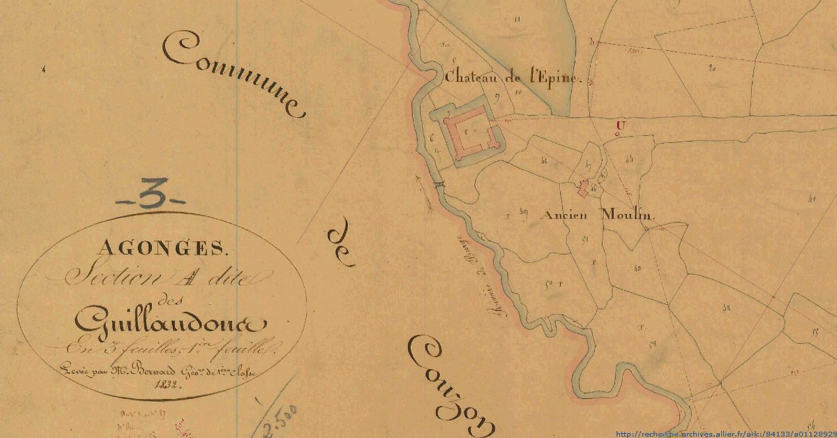 plan cadastral chateau de l'epine (agonges)